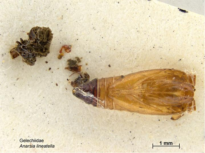 Anarsia lineatella cocoon